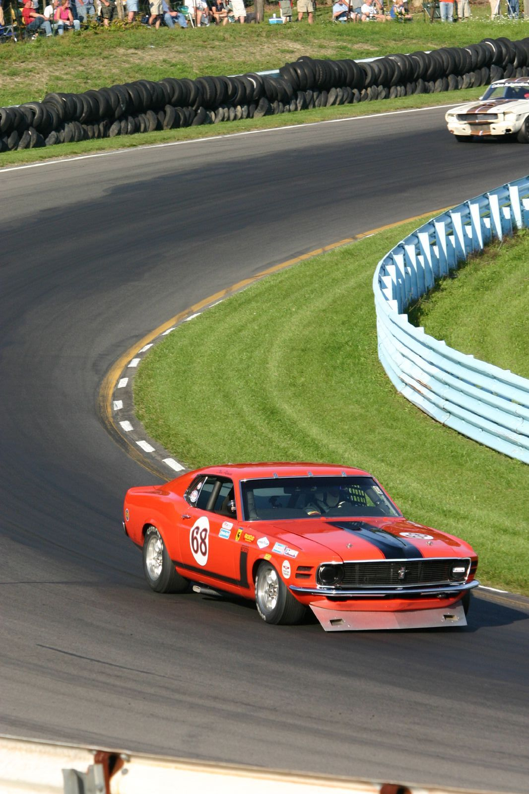 68 - 1970 Ford Boss 302 (302cid) Dave Putnam Glenwood, MD